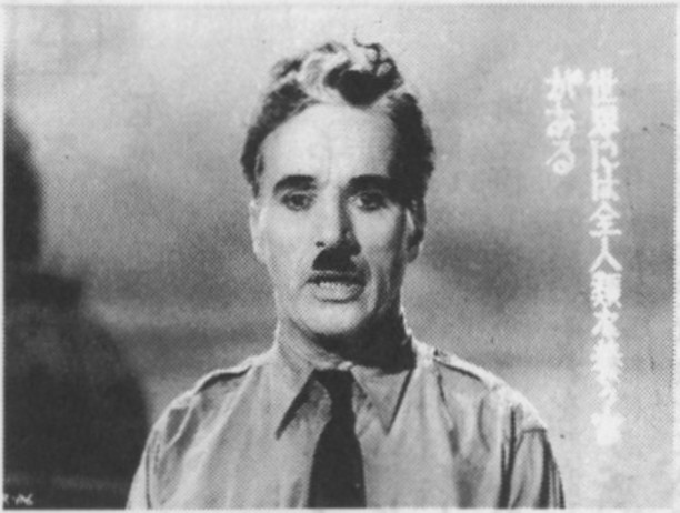 映画「独裁者」のチャップリンの演説の日本語字幕版 写真提供：財団法人 川喜多記念映画文化財団